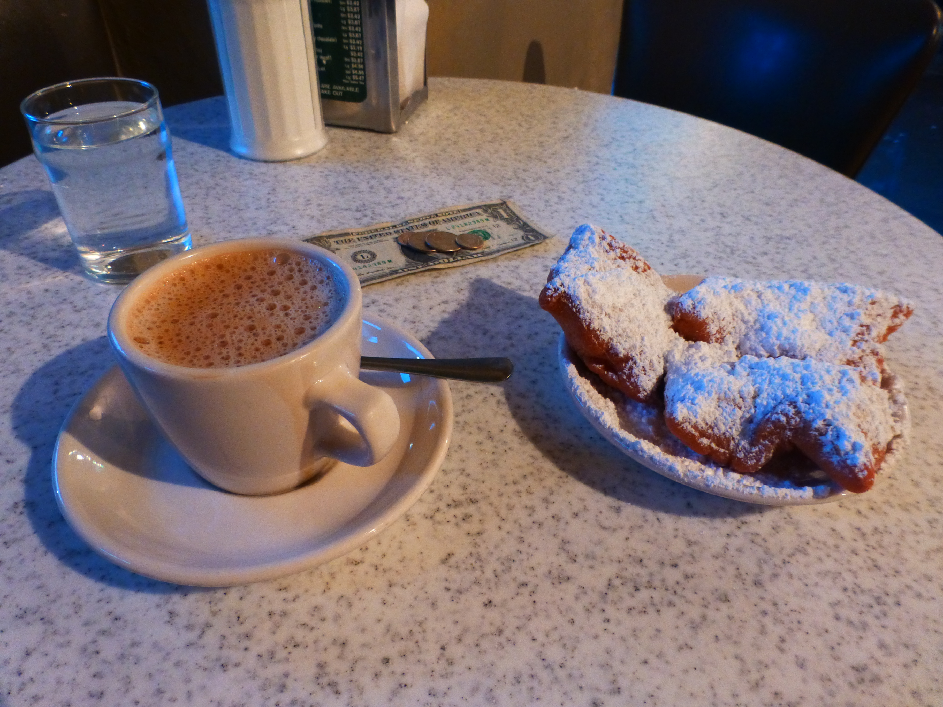 Cafe au Lait and Begniets at Cafe du Monde, New Orleans